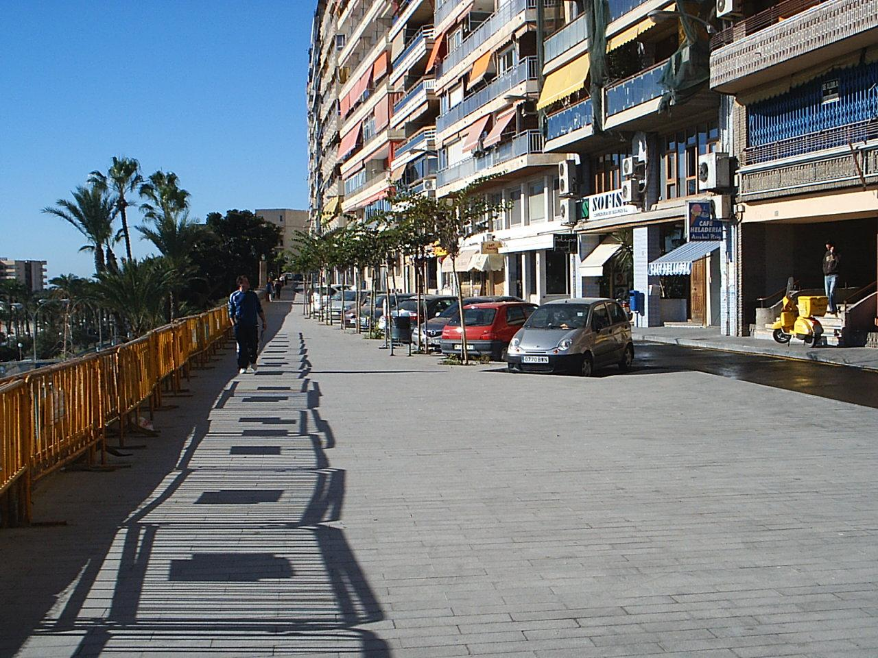 Vista de Virgen del Socorro hacia el sur desde la Plaza de Topete